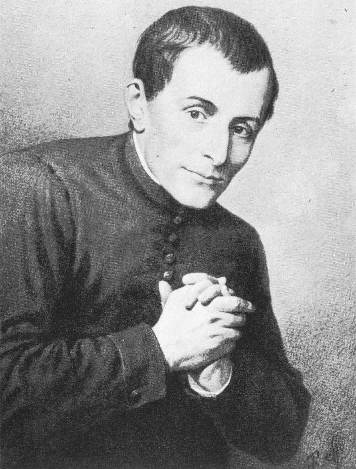 Ritratto di Giuseppe Cafasso realizzato da Enrico Reffo